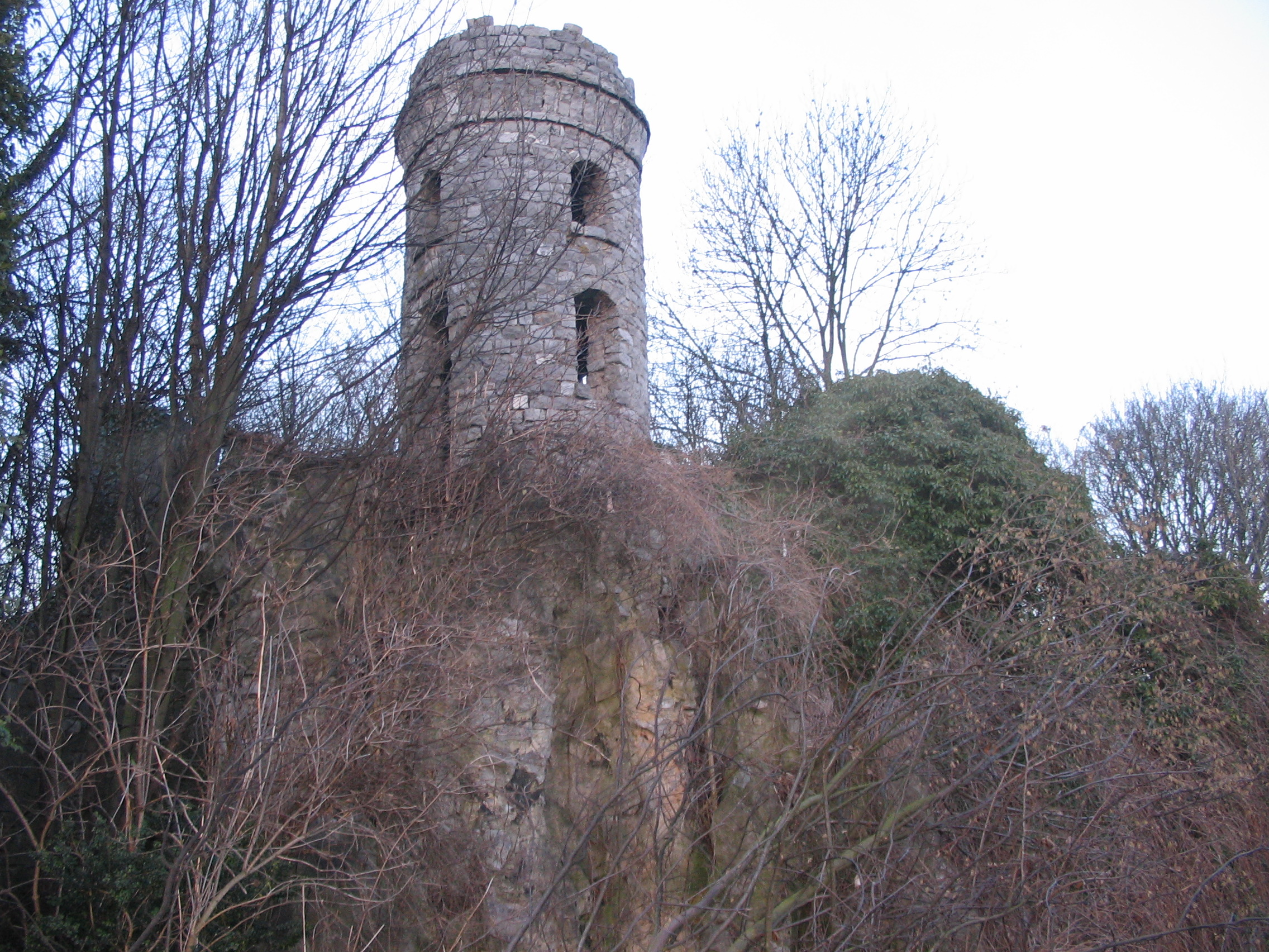 Neerwinden, Flandres - vestiges d'une tour.